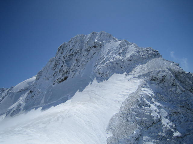 Le Crast' agüzza depuis le refuge marco e rosa